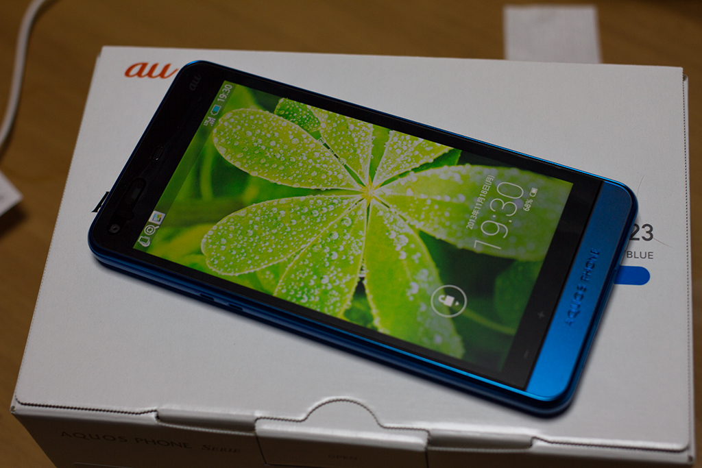 au 4G LTE 2013年冬モデル